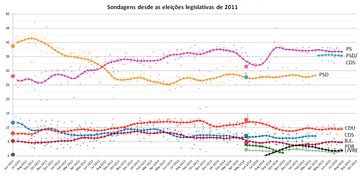 Média quinzenal dos resultados das sondagens desde as eleições legislativas de 2011